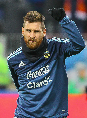 Месси и Ко обыграли сборную России